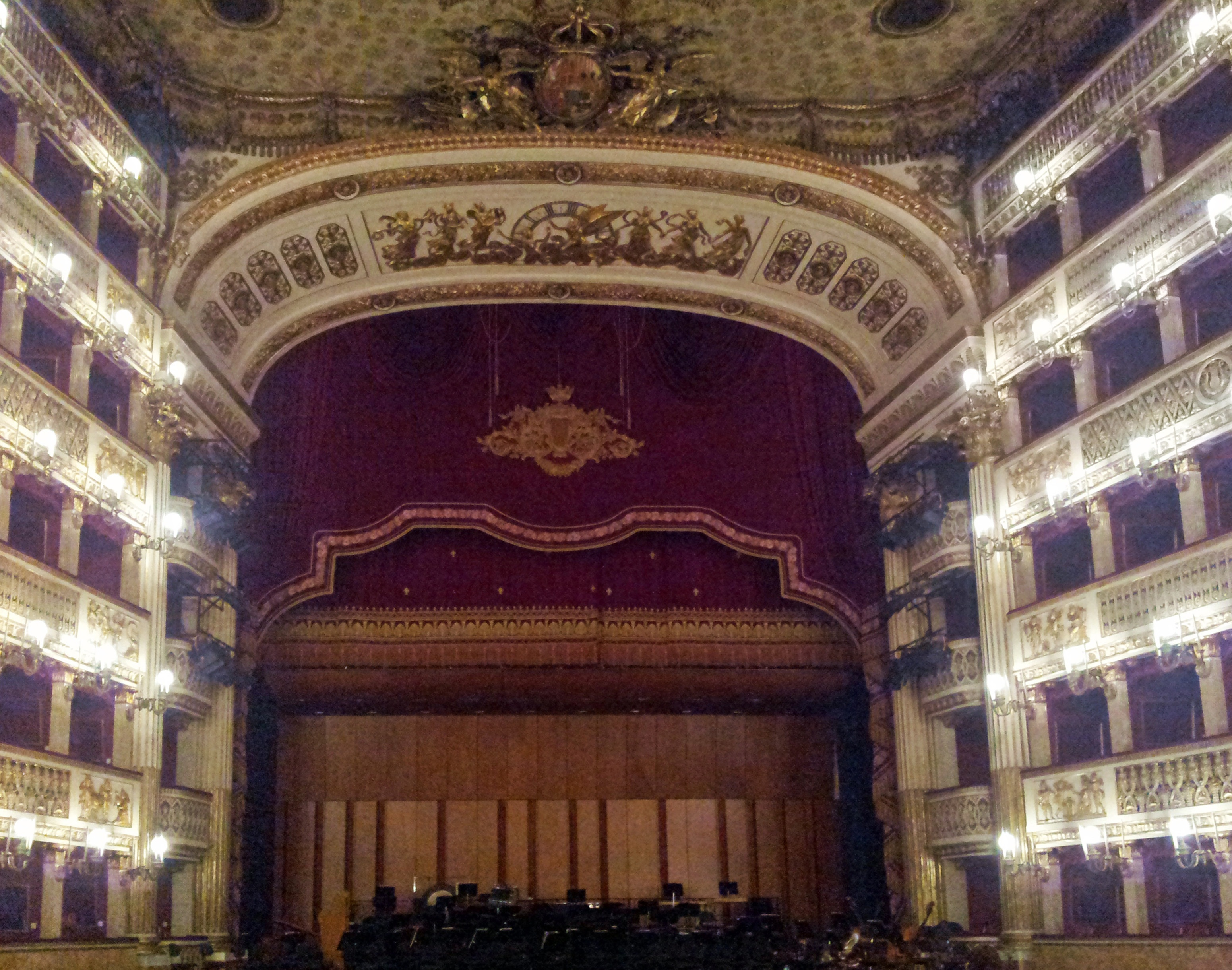 Interno del Real Teatro di San Carlo di Napoli